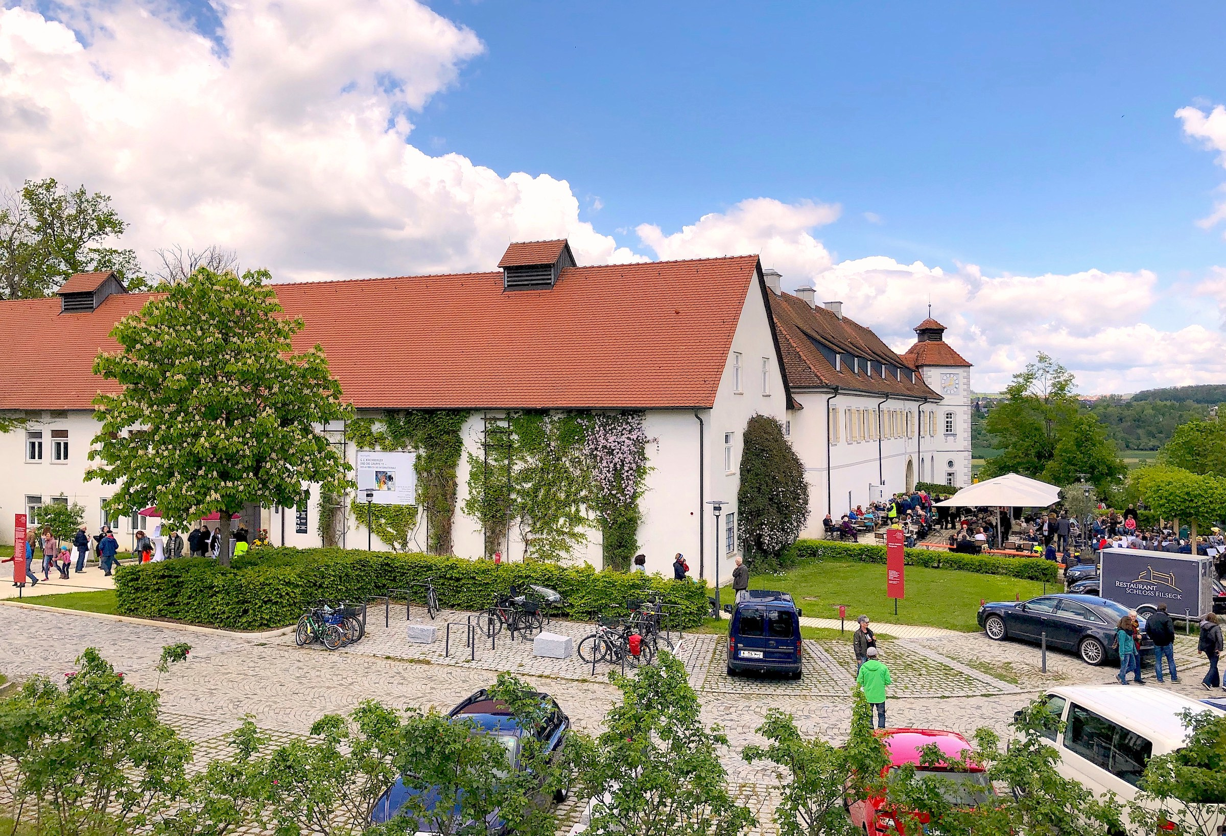 Schloss Filseck mit Teilen der Außenanlage (aufgenommen anlässlich des Schloss-Festes 2019)